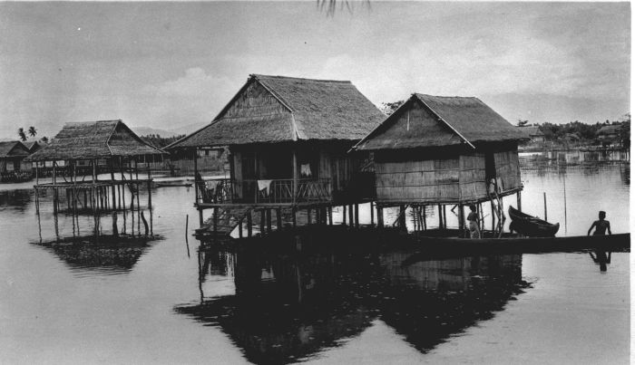 Foto. Paalwoningen in het meer van Limboto